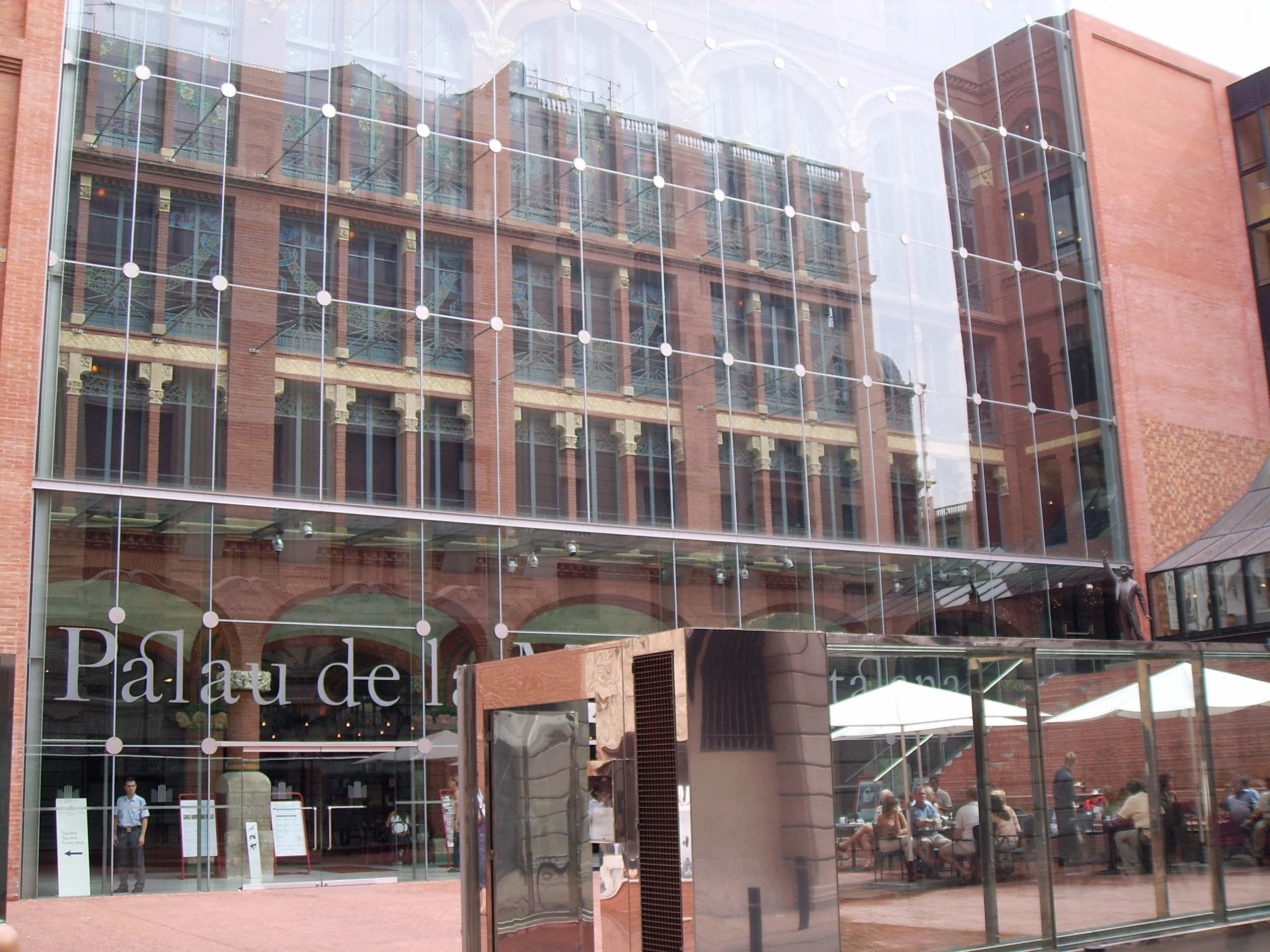 Palau de la Musica Catalana, Barcelona, Catalunya, Spain